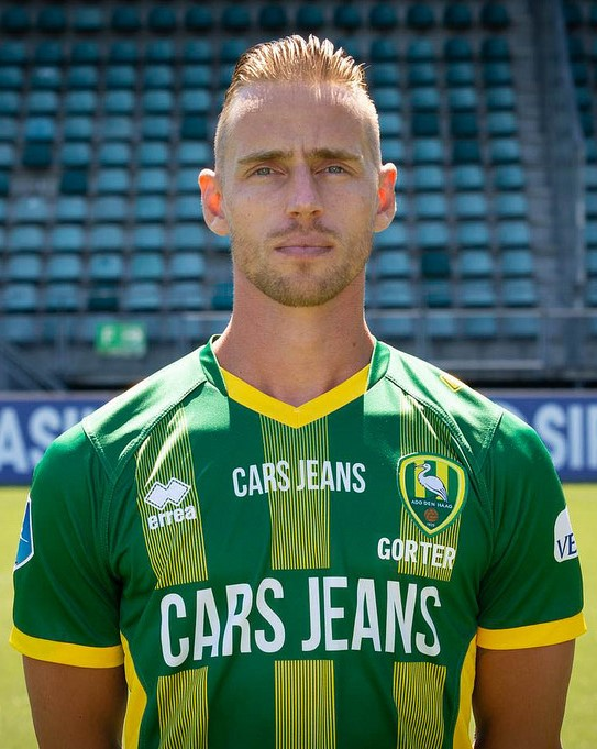 Donny Gorter